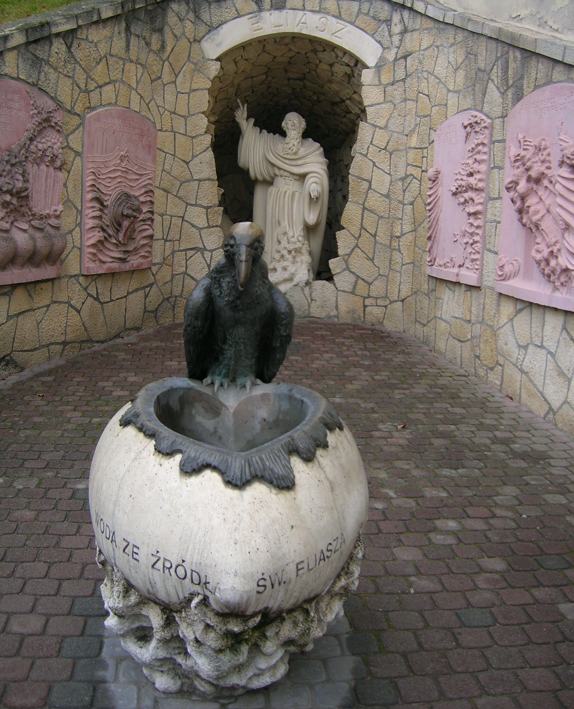 Eliasz. Czerna